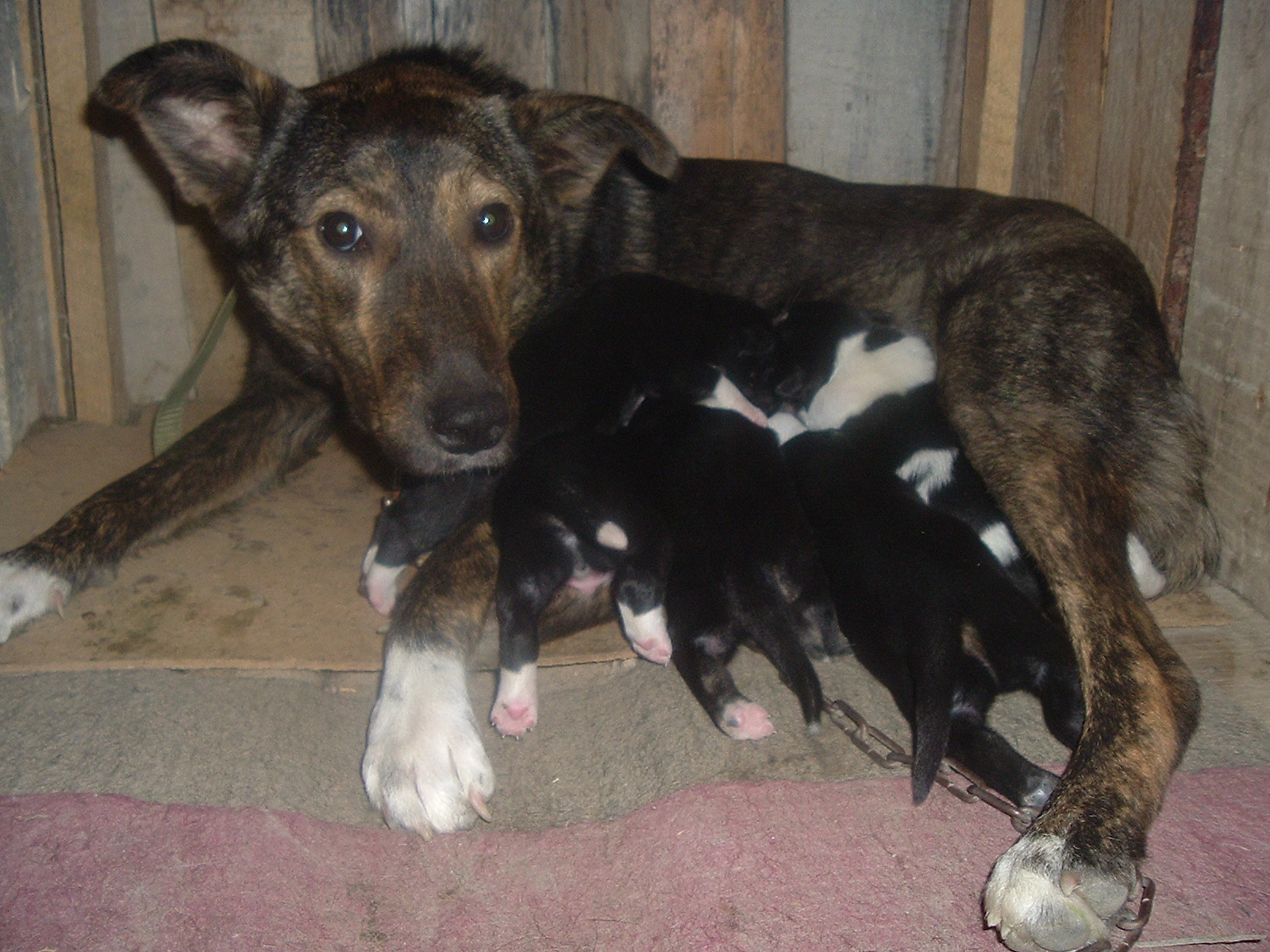 Chienne avec chiots (Checker comment elle a l'air excitée :O)